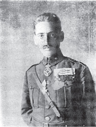 Ο Μέραρχος της Ανεξάρτητης Μεραρχίας, Συνταγματάρχης Δ. Θεοτόκης.